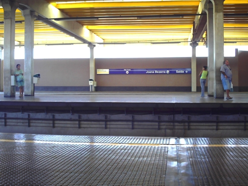 MetroRec - Estação Joana Bezerra